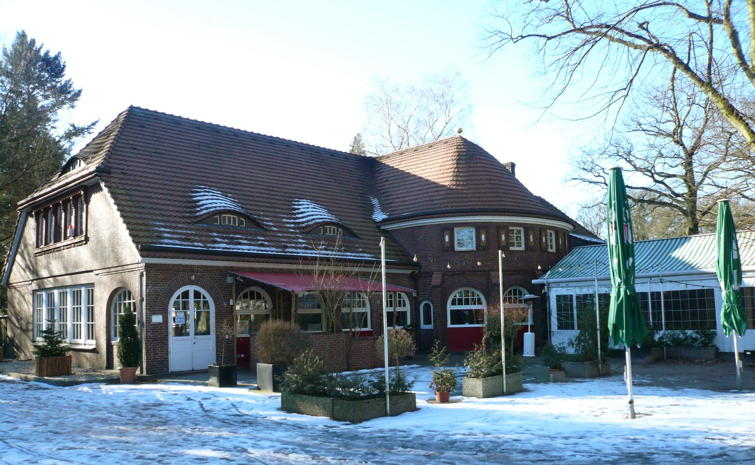 Landhaus Walter im Hamburger Stadtpark, Architekt: Fritz Schumacher